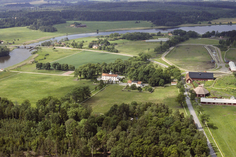 Erikssunds herrgård i bildens mitt. Fotot från öster. Motiv: Erikssund Nyckelord: Flygbilder, Riksintressen Kategori: Herrgårds-/slottslandskap Erikssunds herrgård i bildens mitt. Fotot från öster. Länsväg 263 går genom området och över bron.